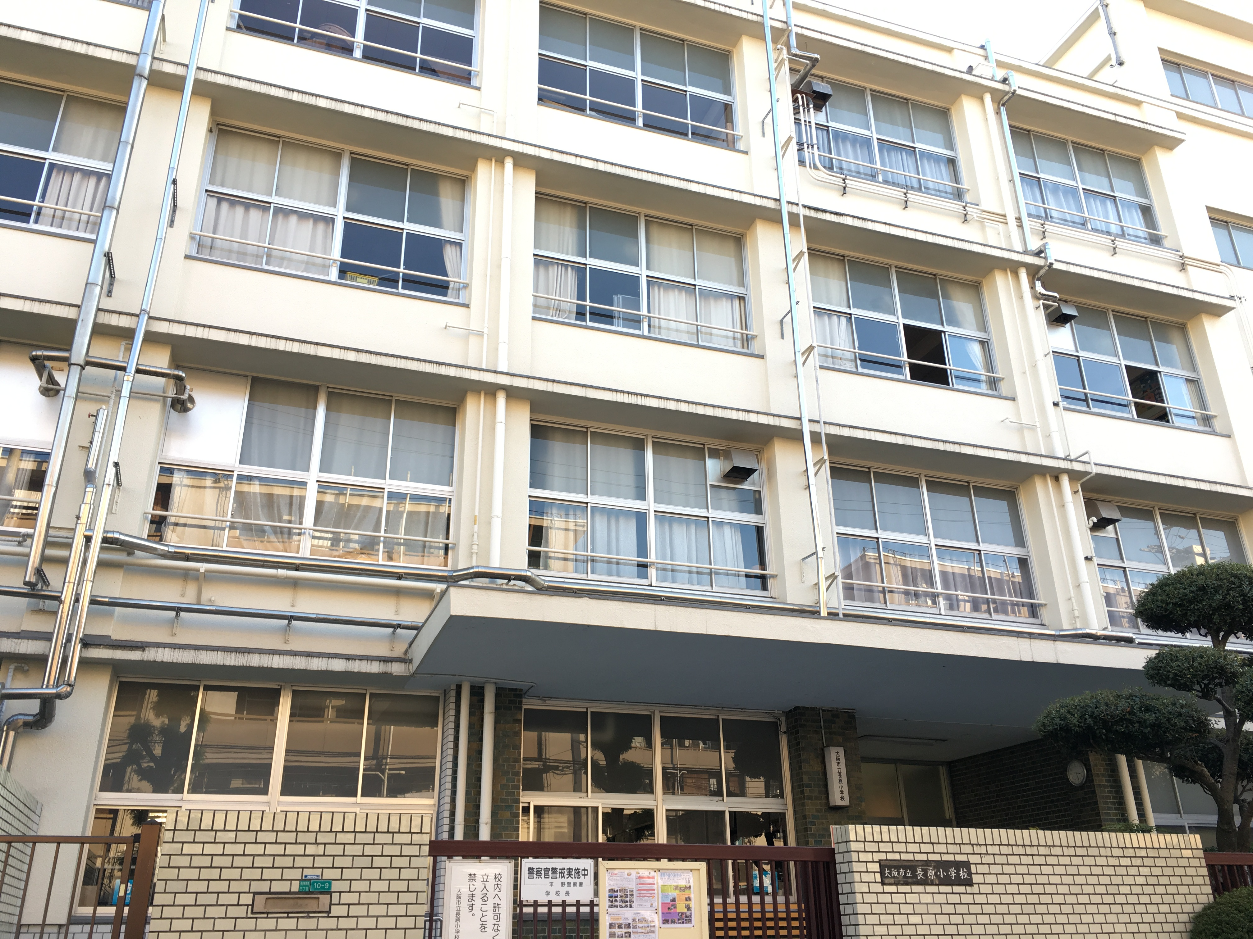 大阪市立長原小学校